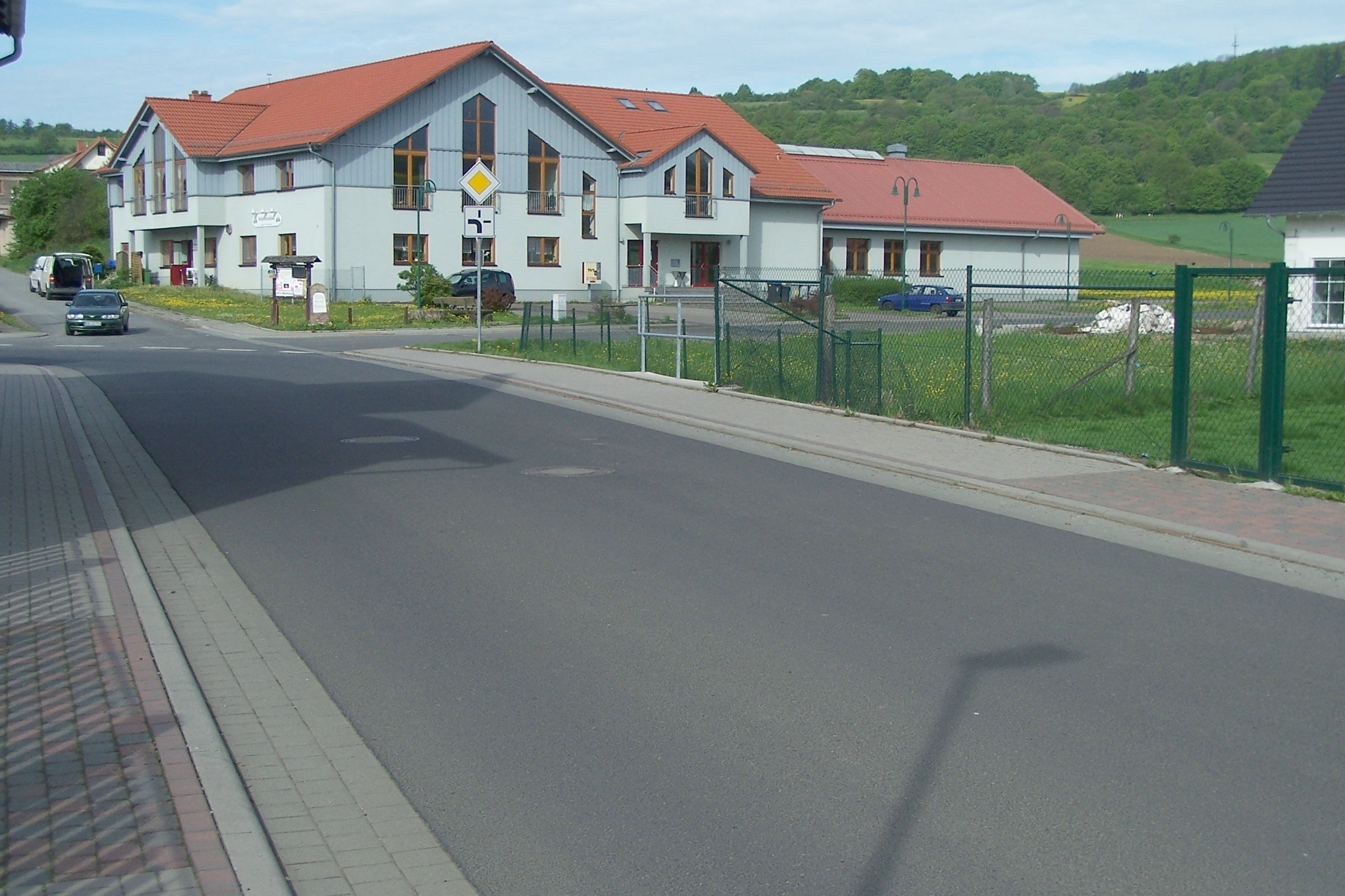 Das Dorfgemeinschaftshaus am nordwestlichen Ortsrand (Umpfenstraße) mit der "Rhönküche".